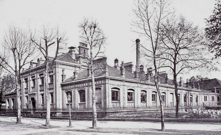 Mulhouse. Ecole de chimie. Bibliothèque nationale et universitaire de Strasbourg